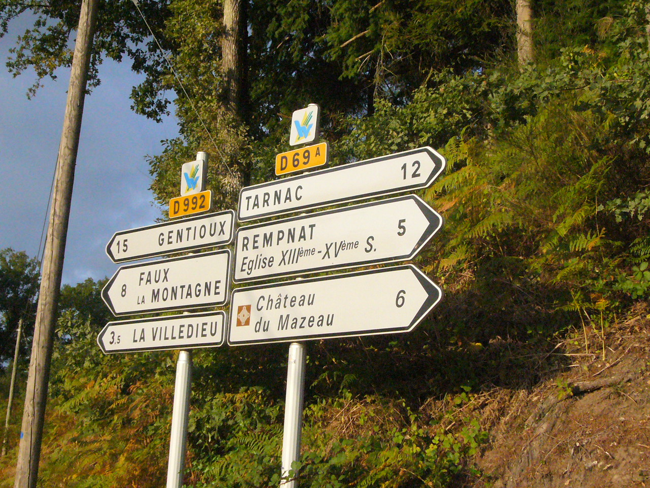 Panneaux indicateurs près de Nedde, Haute-Vienne, France